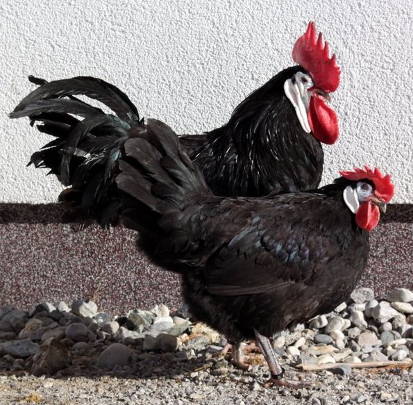 Spanier Hahn und Henne